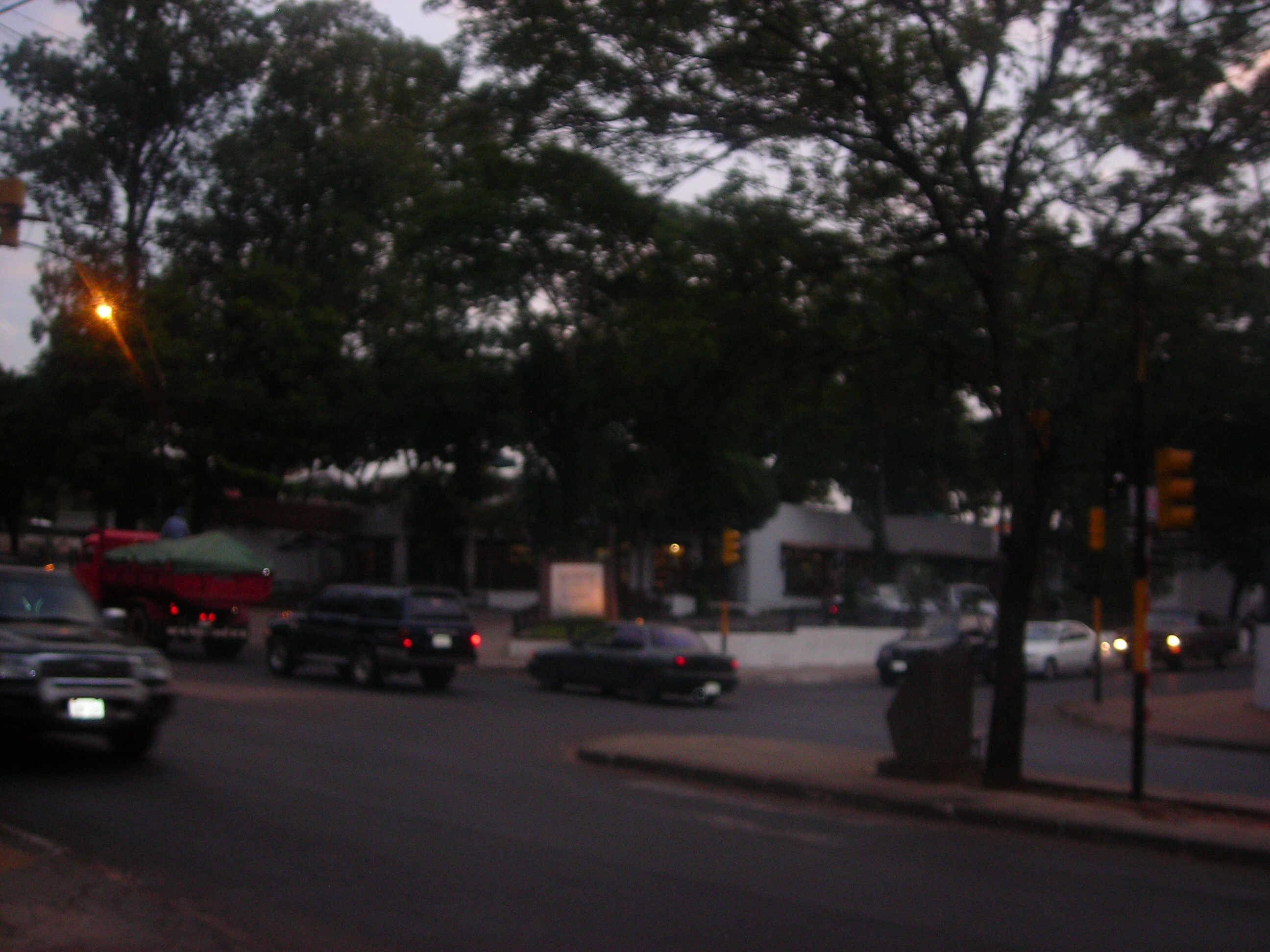 avenida Rp